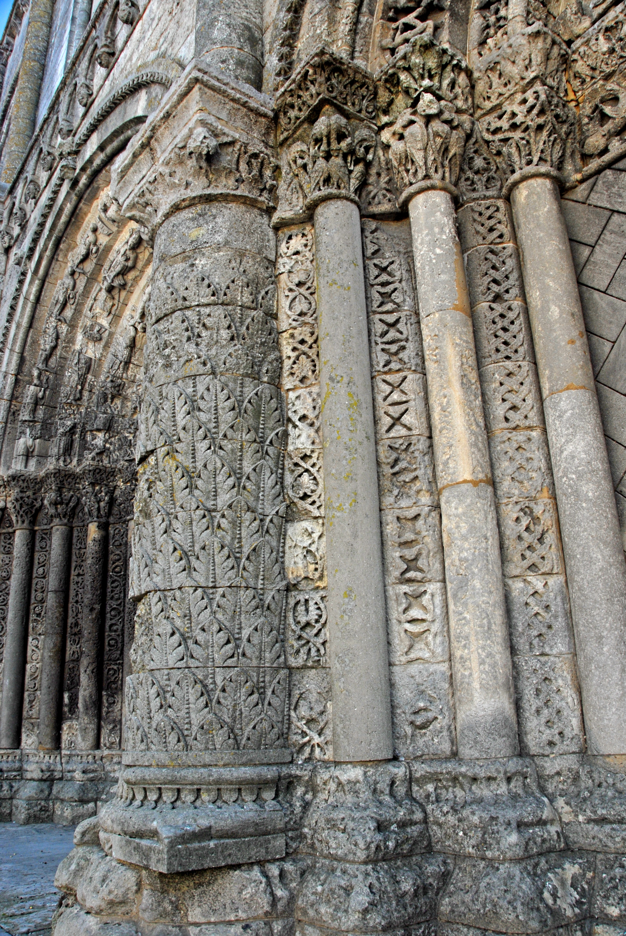 St-Pierre de Pont-l’Abbé-d’Arnoult (17), Säulenreihe, links vom rechten Scheinportal